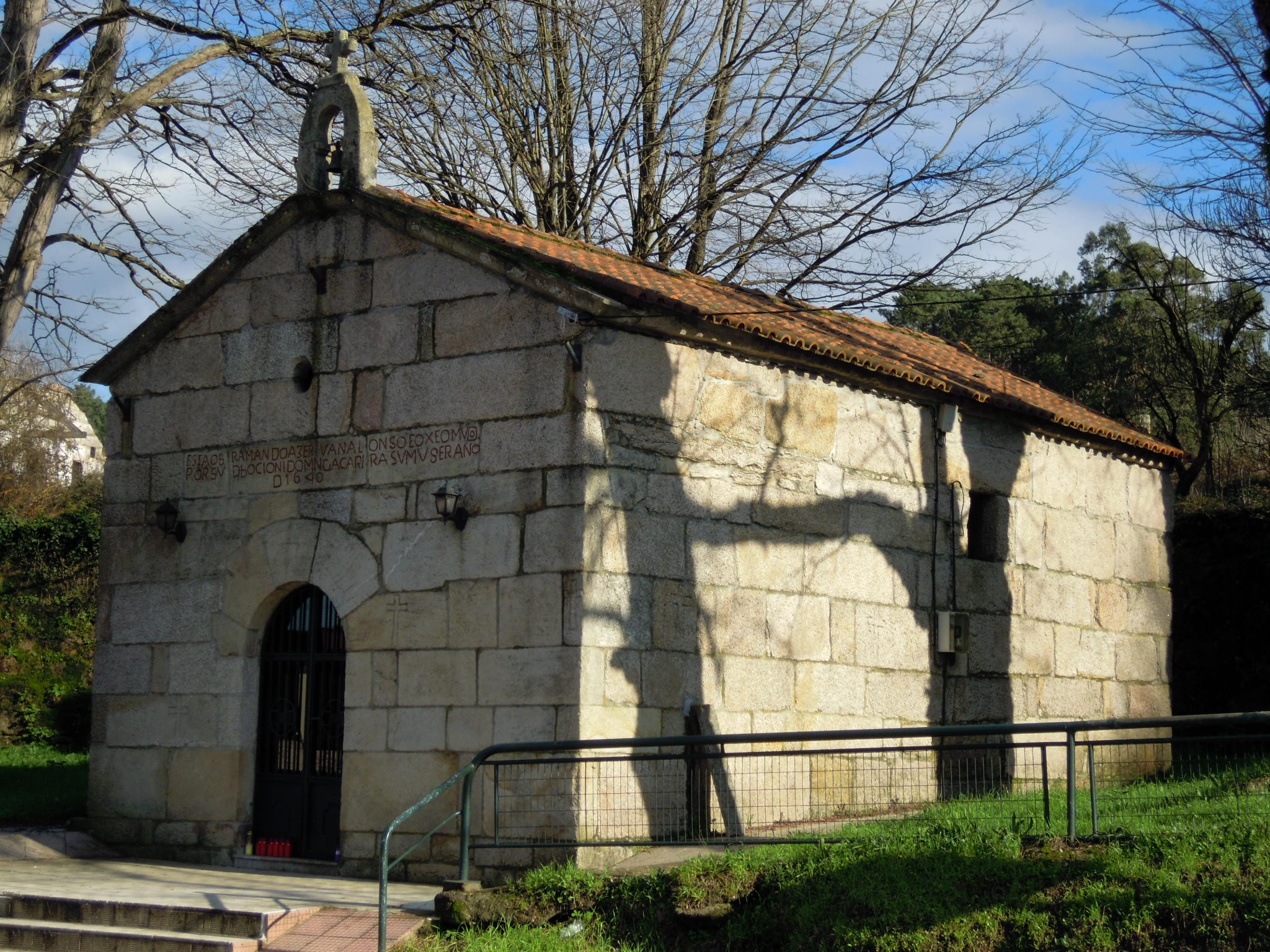 Capela da Virxe da Guía, no lugar da Guía, parroquia de Atios, O Porriño, á beira da vía portuguesa do camiño de Santiago